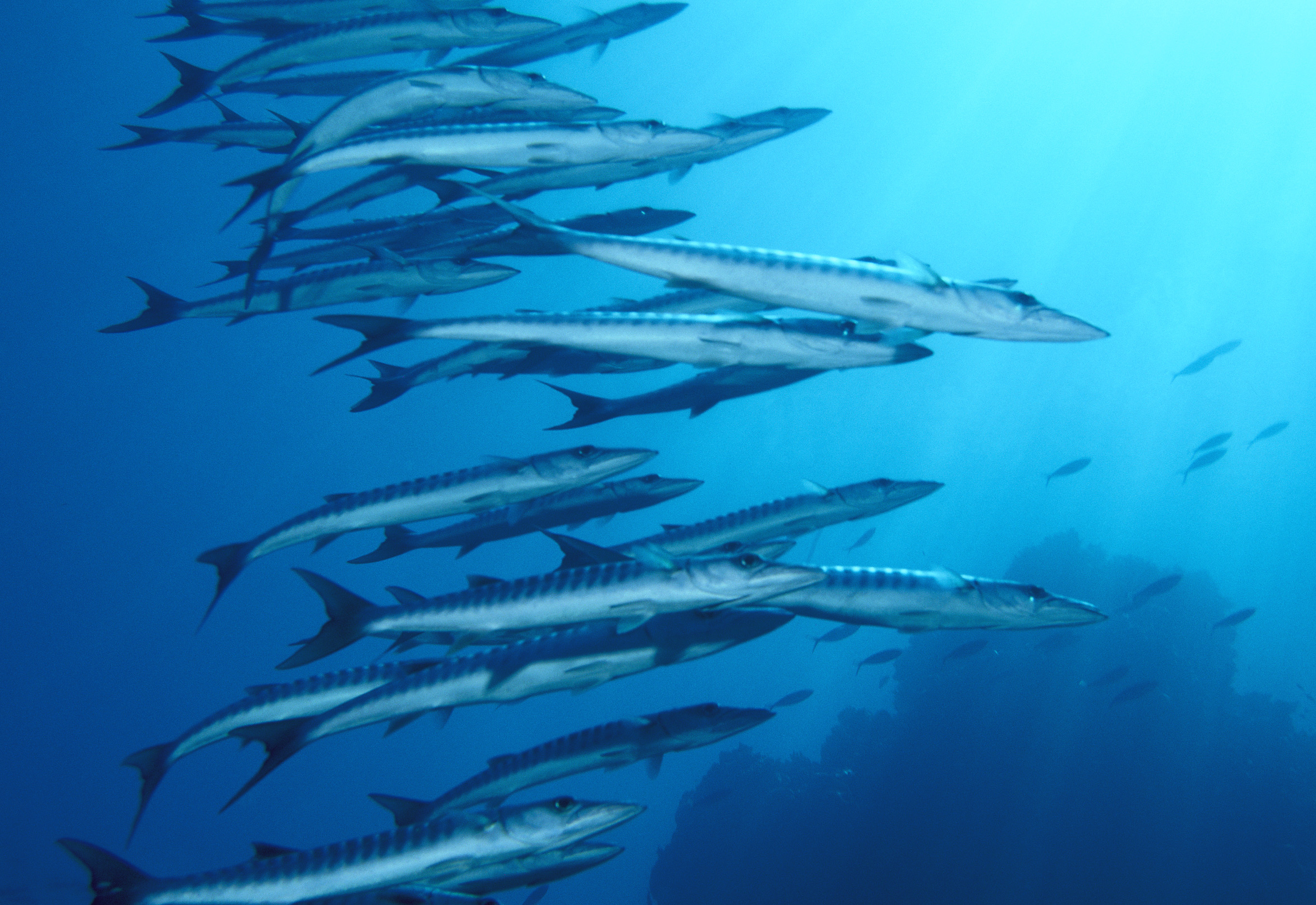 Barracuda